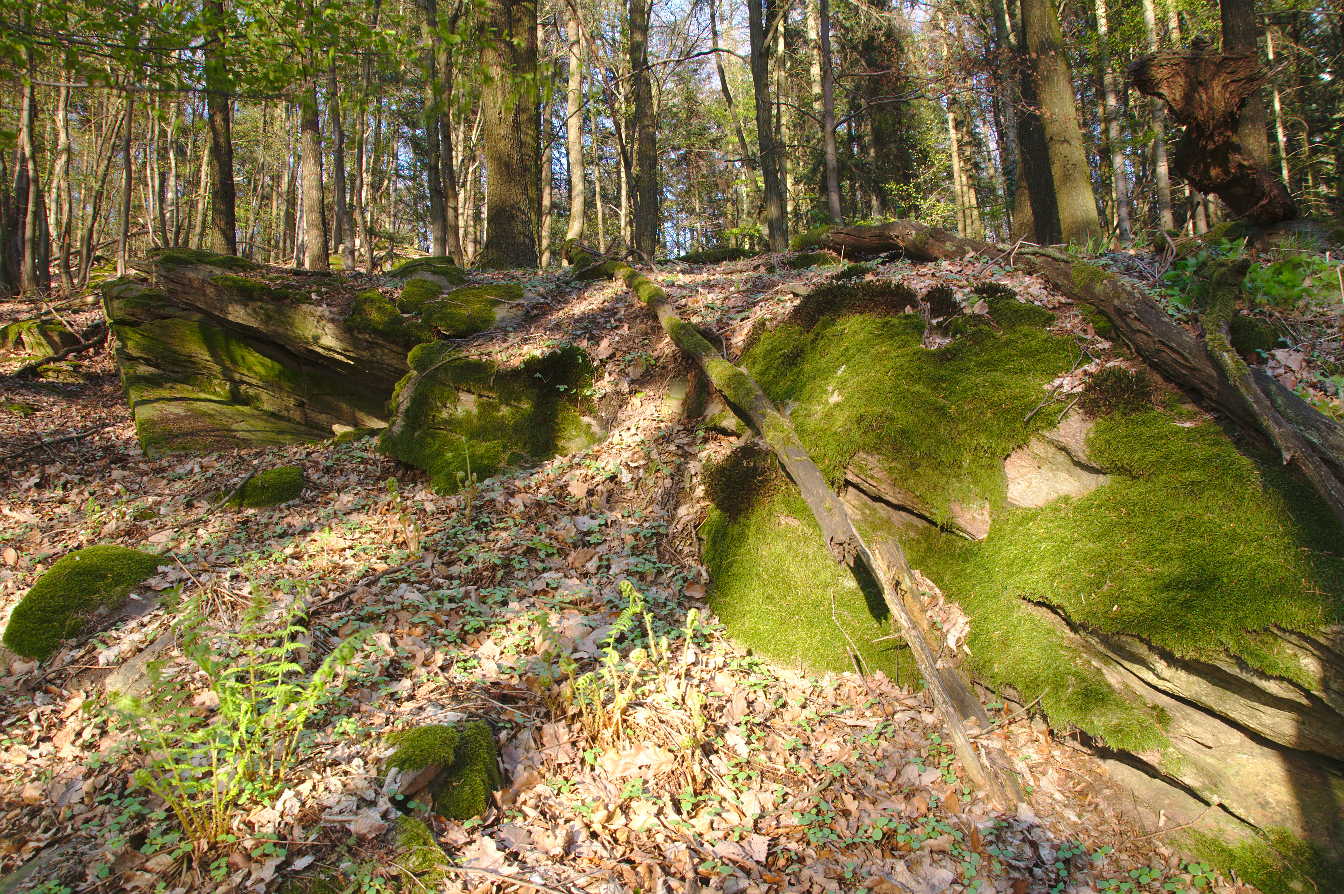 Přírodní památka Hrušín, okres Brno-venkov